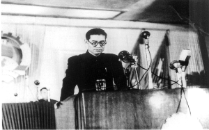 1949年，解放区代表高岗在新政协会议上讲话